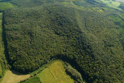 Sokorópátka, Hungary, aerialphotography